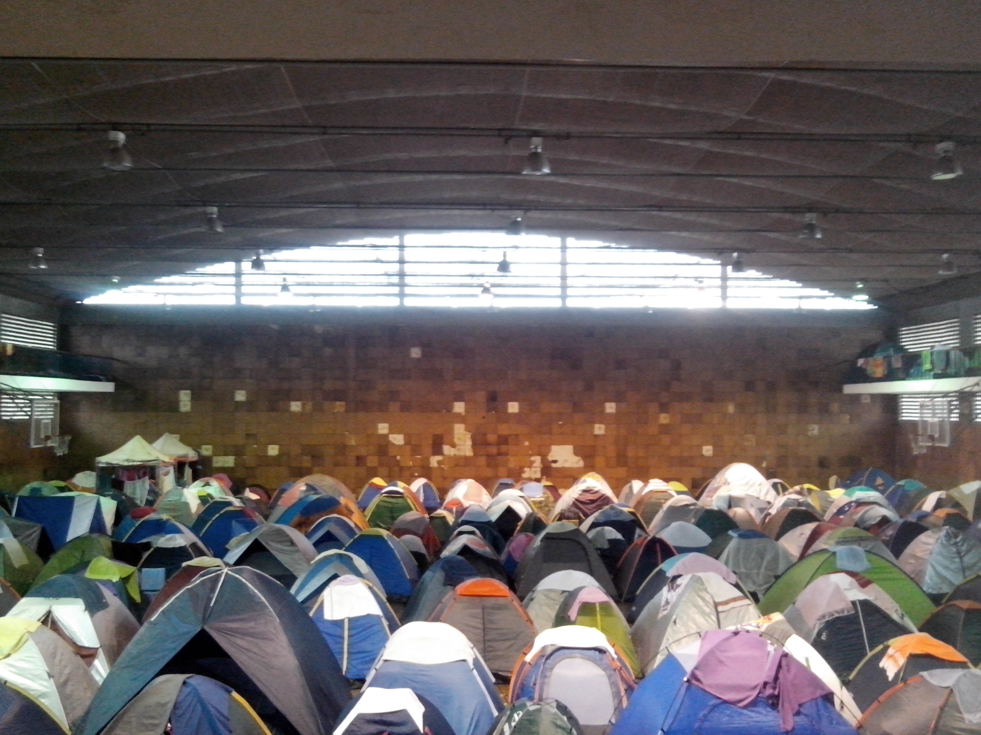 Barracas dos participantes do ENEA Rio na "Cidade FeNEA", montada na Escola de Educação Física e Desportos da Universidade Federal do Rio de Janeiro.